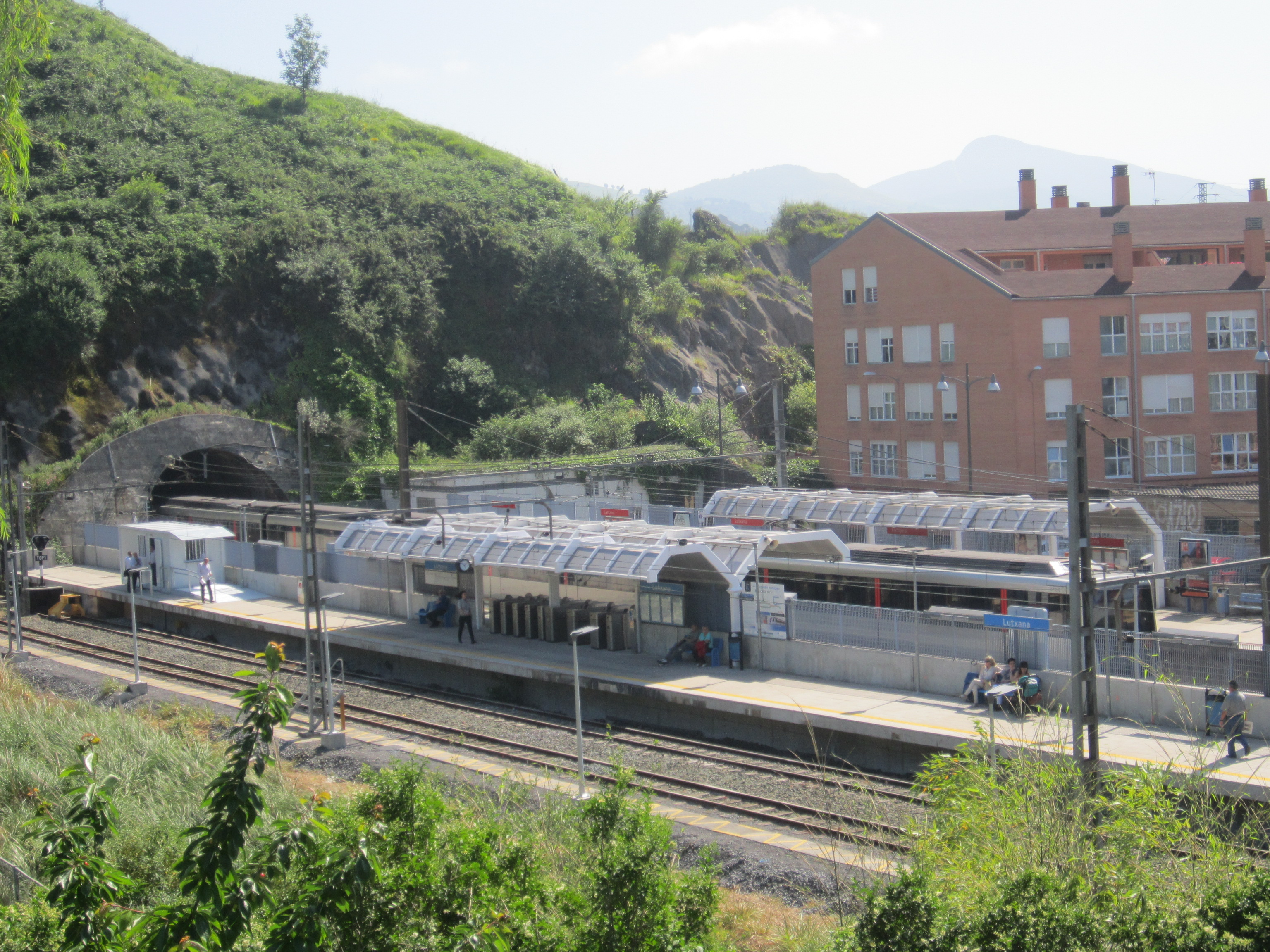 Vista de la estación de Lutxana (Erandio)